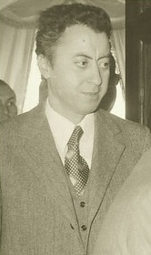 Mr Tijani Chelli ancien ministre de Bourguiba